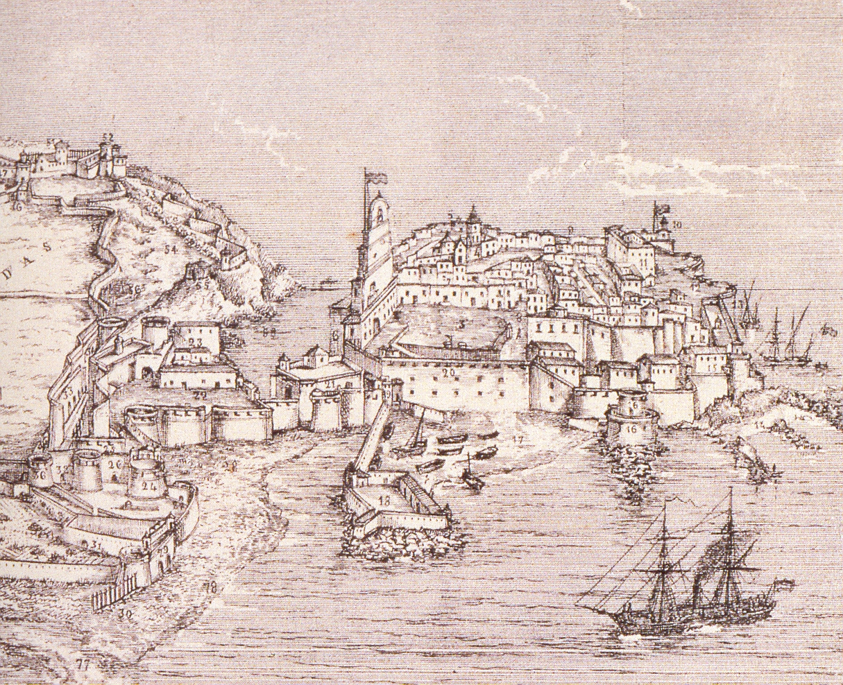 Litografía de Melilla